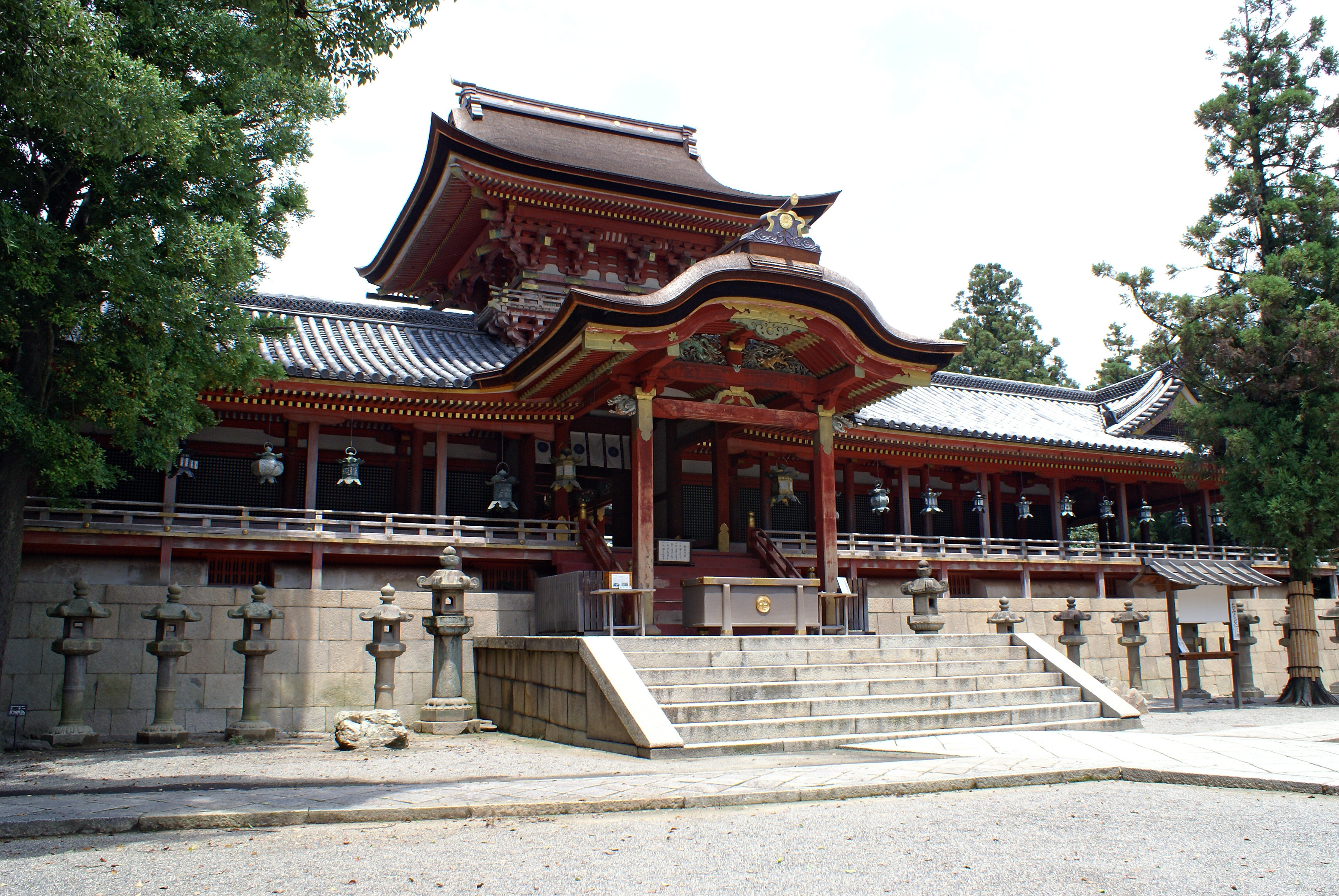 Iwashimizu Hachimangu in Yawata, Kyoto, Japan